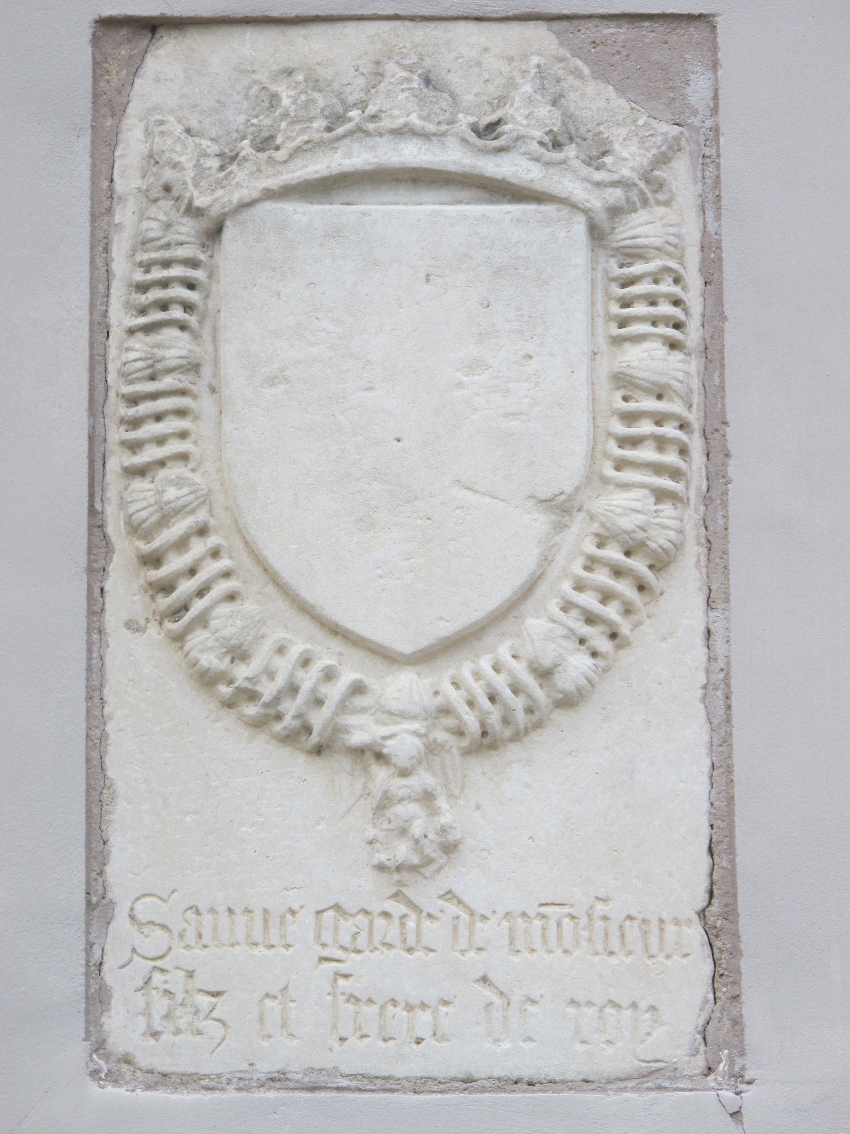 Plaque sur les communs du château des Clayes-sous-Bois. La plaque représentant un écu ou un corps de blason, sur lequel sont gravées trois fleurs de lys des rois de France avec un collier de l'ordre de Saint-Michel autour (XVIe siècle).